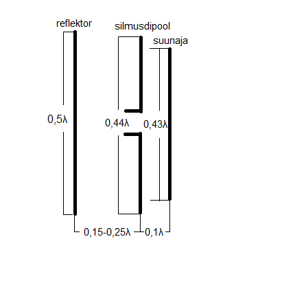 Pilt 1. Kolme elemendiga Yagi antenn